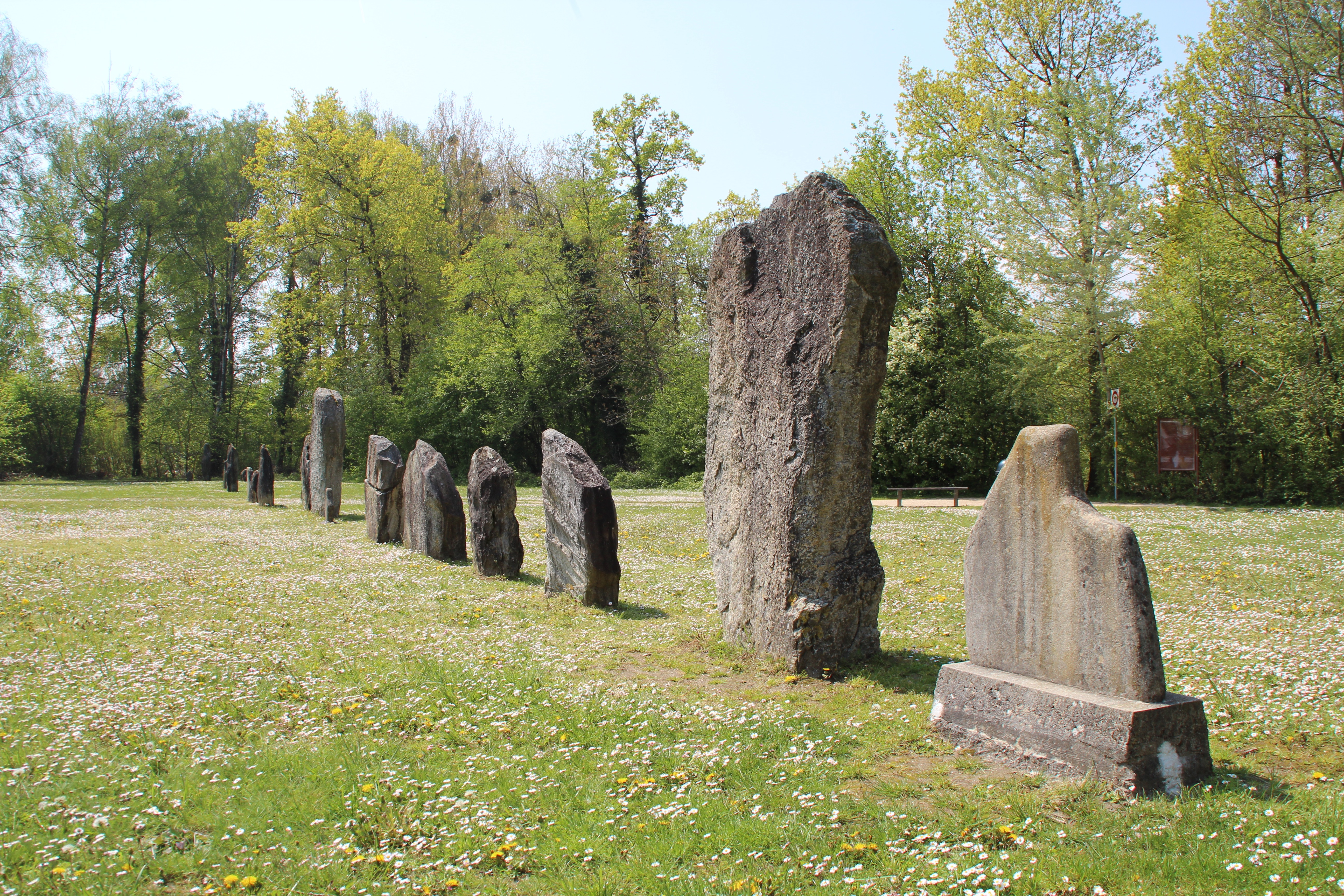 Alignement von Clendy in Yverdon